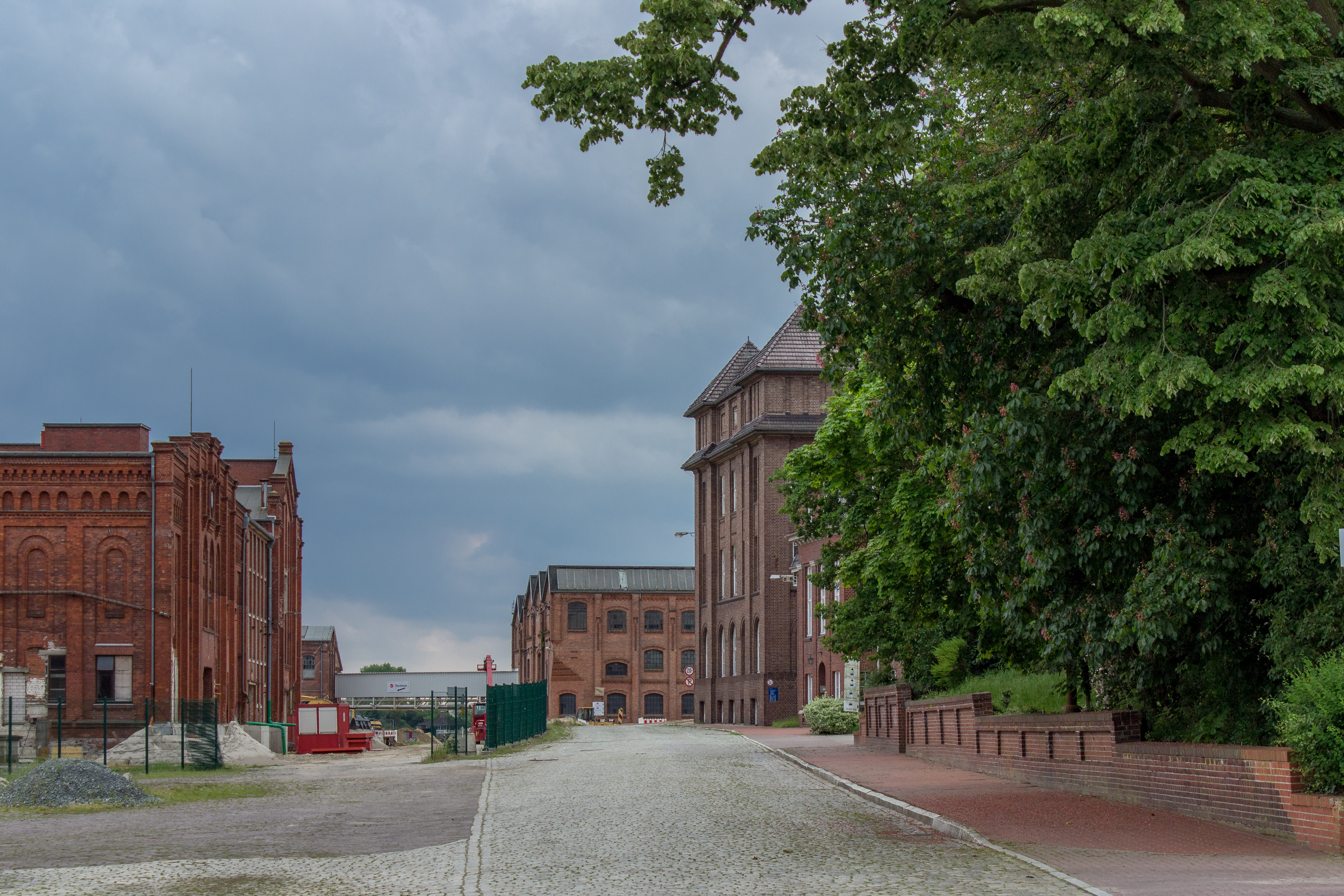 Bremer Woll-Kämmerei in Bremen, Landrat-Christians-Straße 95Die Denkmalgruppe ist ein geschütztes Kulturdenkmal in der Freien Hansestadt Bremen, mit der Nr. 2000 beim Landesamt für Denkmalpflege registriert.